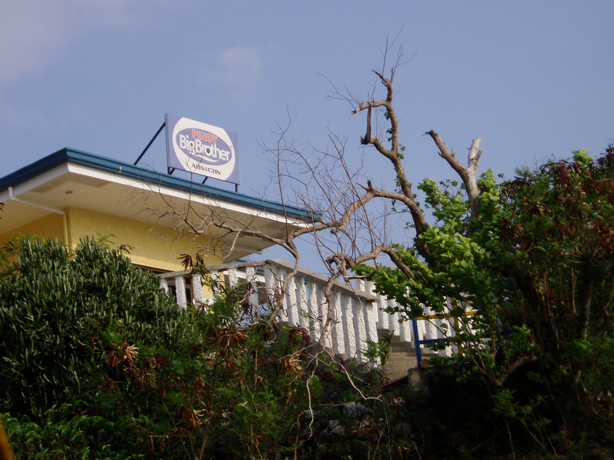 Tagalog: Ang bahay ni Kuya (Pinoy Big Brother) sa pulo ng Gobernador, Hundred Islands National Park, Barangay Lucap, Lungsod ng Alaminos, Pangasinan, Pilipinas (aking ginawa)